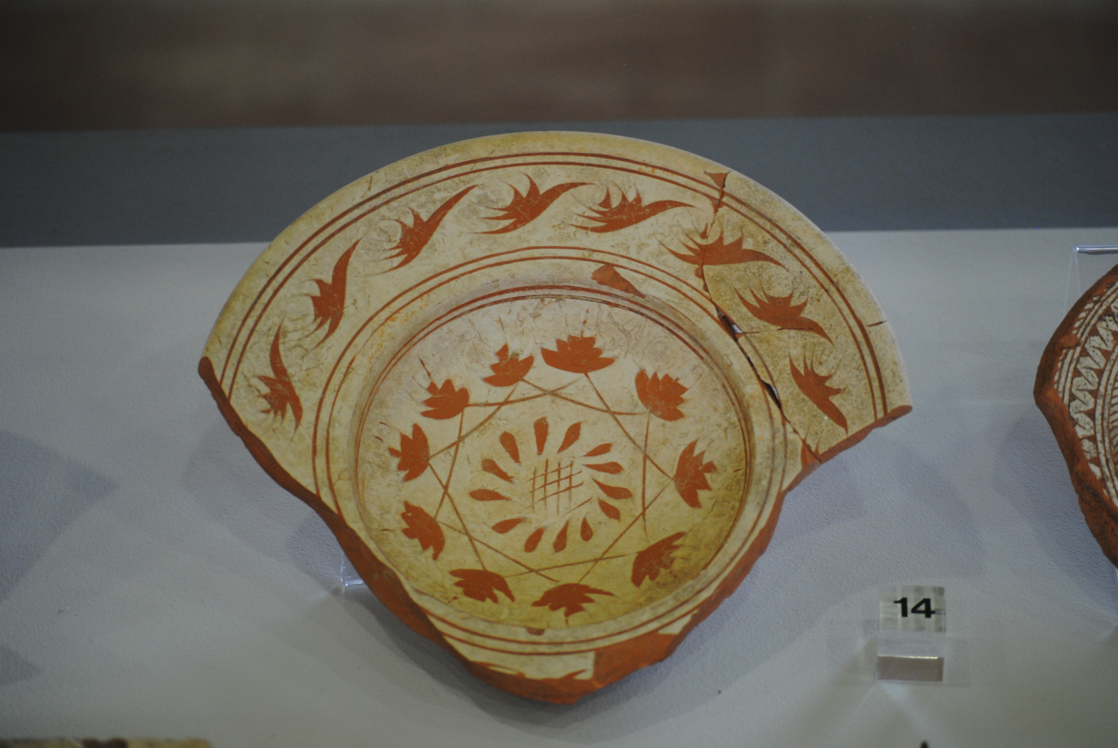 Ciotola Ingobbiata e graffita a stecca con graffiture a punta per delimitare le fasce (scarto di fornace) risalente al 1500 - 1530 (recuperata durante gli scavi di villa Quercioli, Pisa - Museo Nazionale di San Matteo.